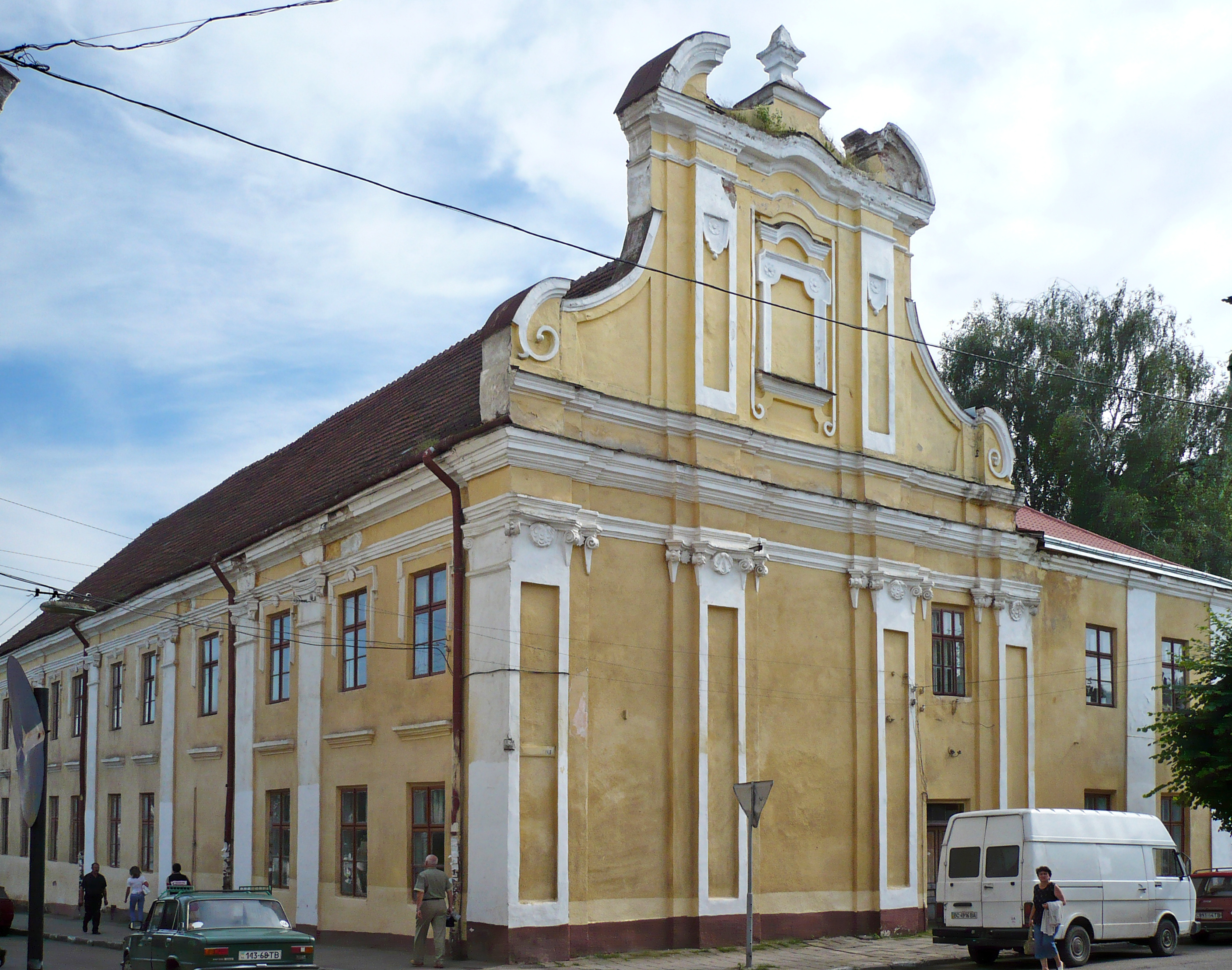 Dawne Kolegium Misjonarzy w Samborze na Ukrainie